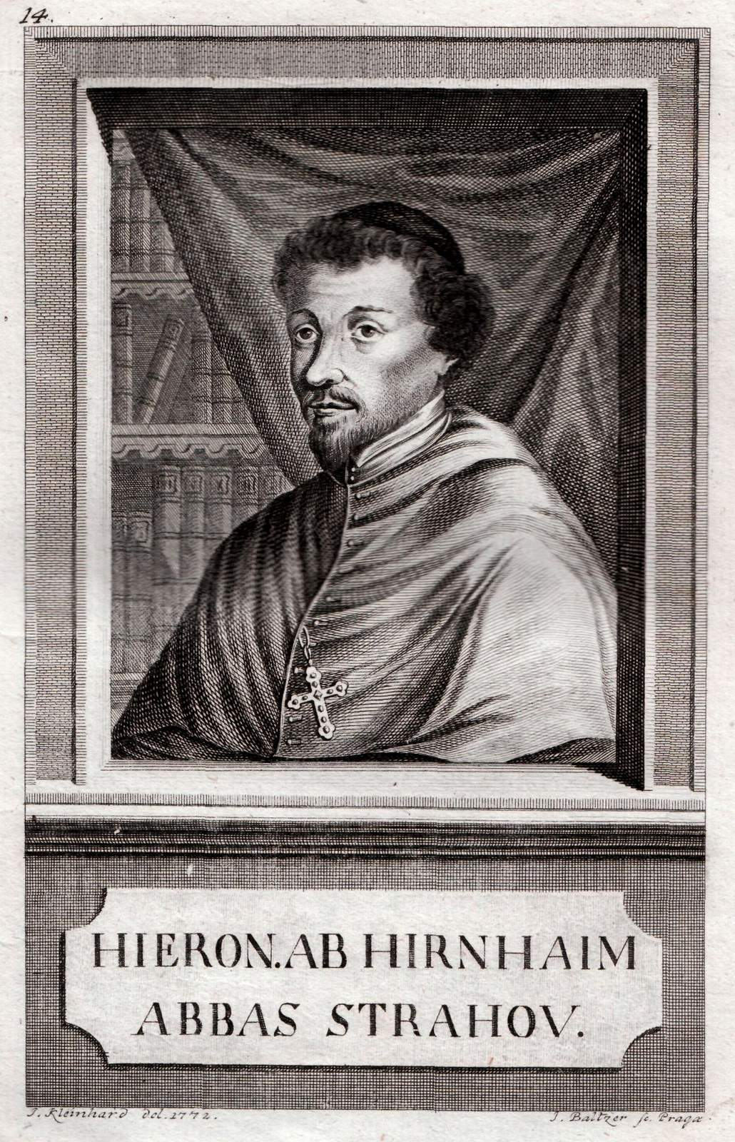 Hieronymus z Hirnhaimu (1637—1679)